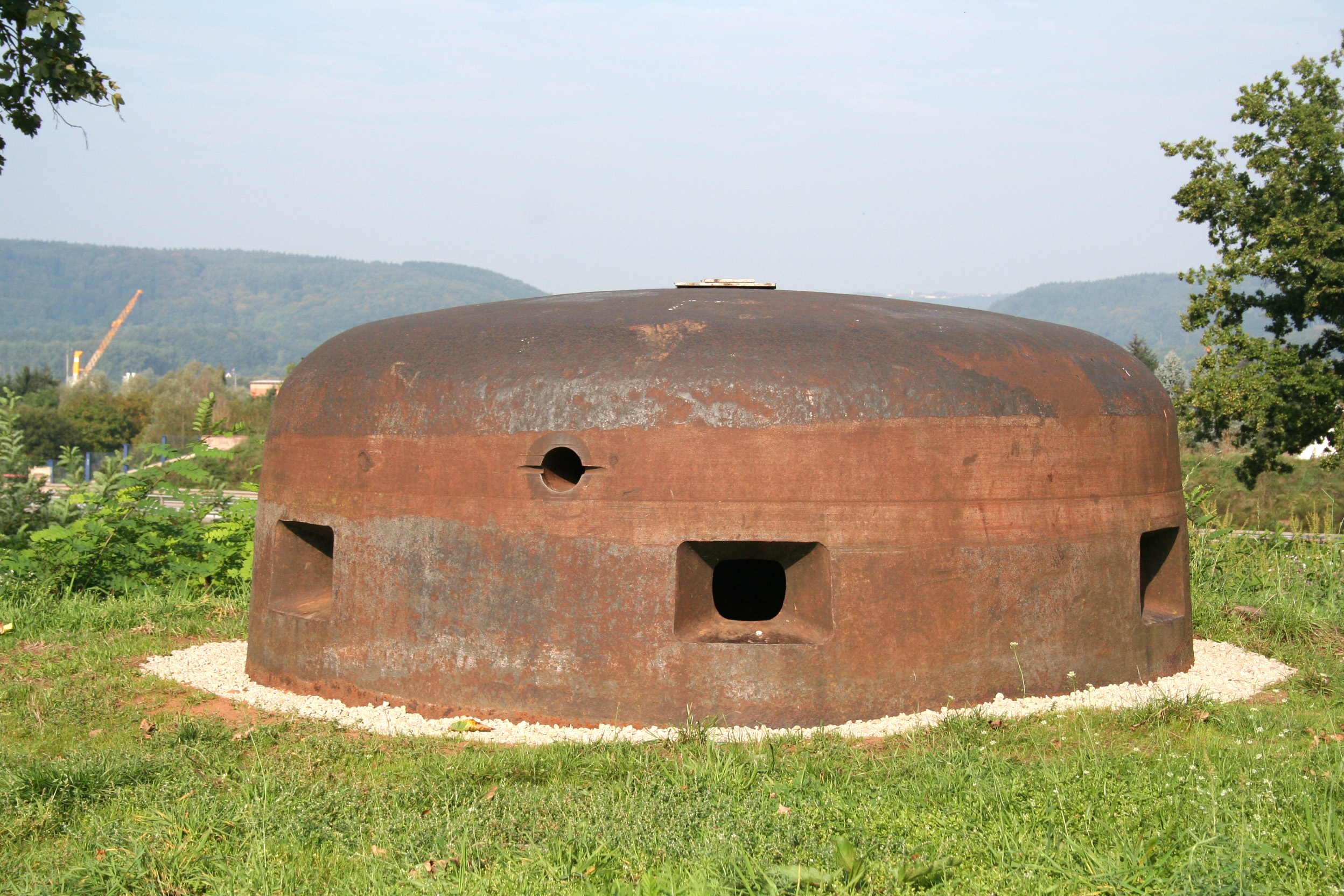 B Werk Besseringen 20P7 Sechsschartenkuppel Sechsschartenturm Panzerkuppel